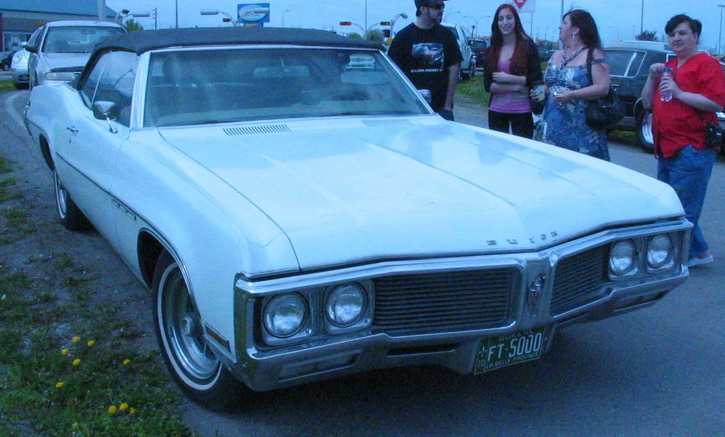 1970 Buick LeSabre photographed in Laval, Quebec, Canada at Auto classique Pièces auto Jarry.